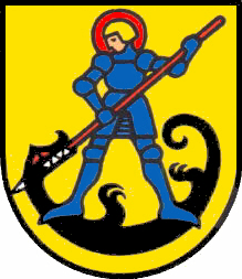 Wappen der politischen Gemeinde Rümlingen, Schweiz